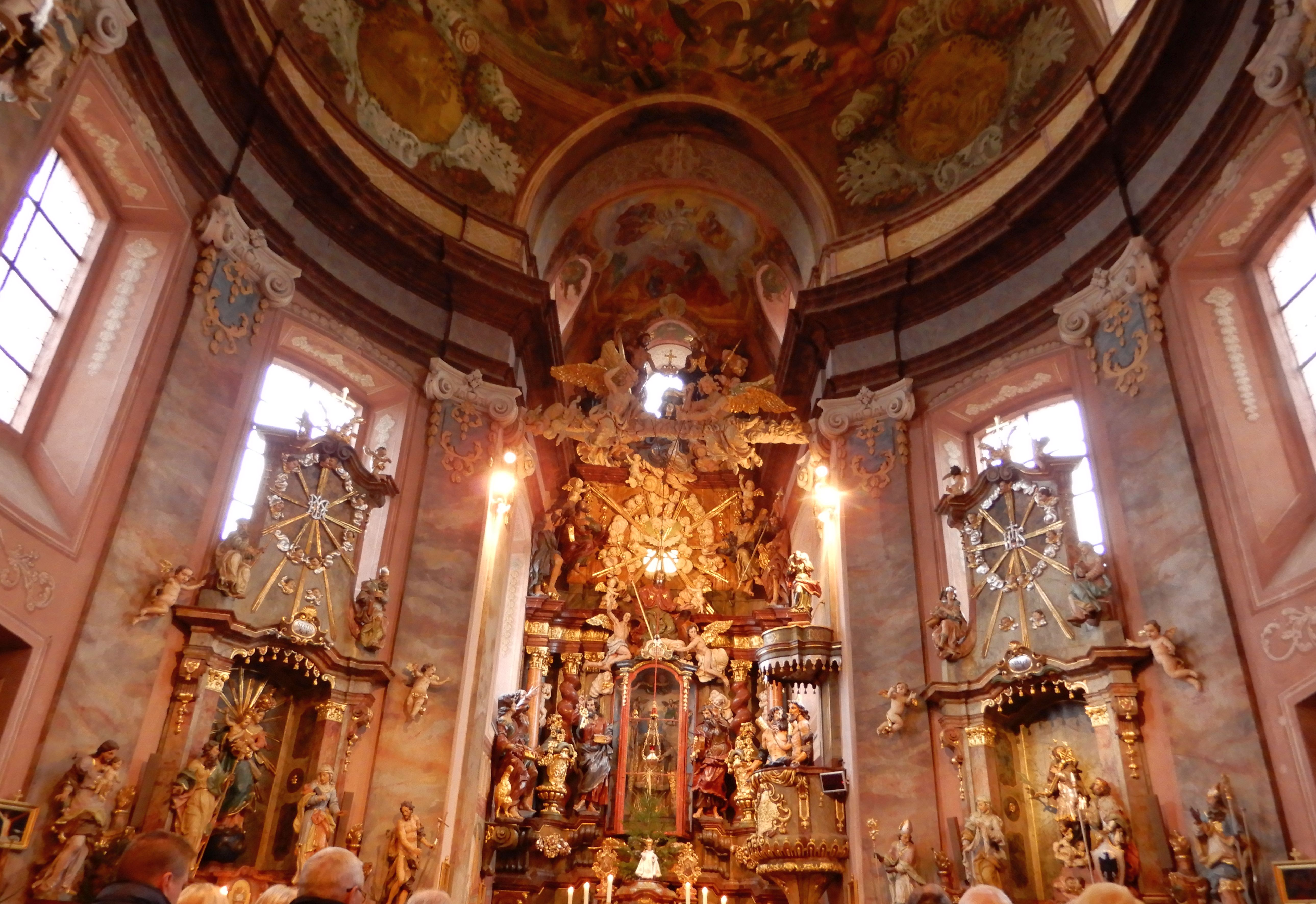 Kunratice (Praha), kostel sv. Jakuba Většího, hlavní oltář